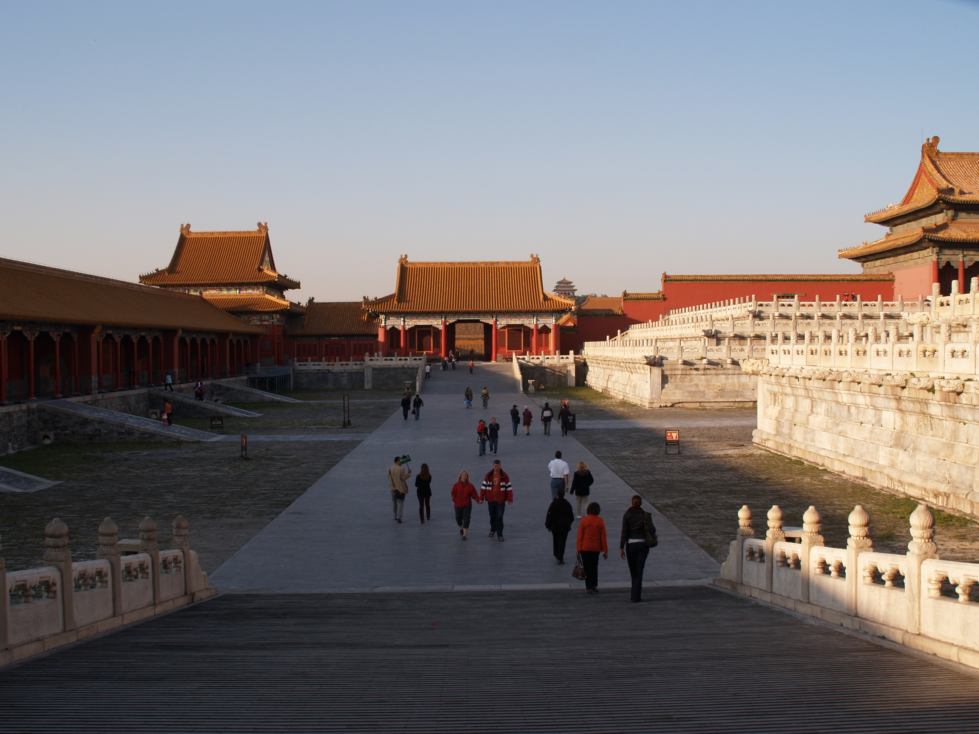 Forbidden City Beijing